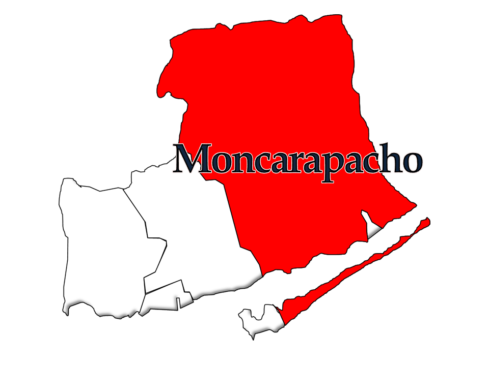 Cenos 1864/2011